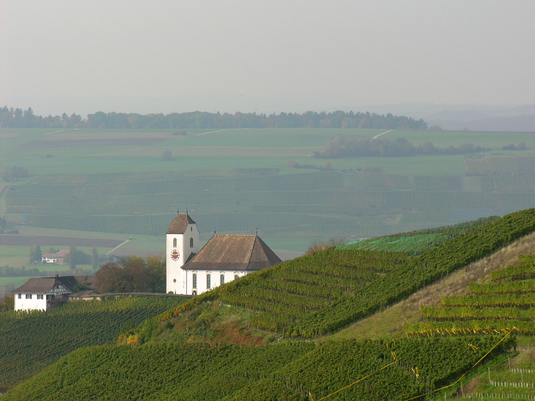 Switzerland, Canton of Schaffhausen, Wilchingen Kirche St. Othmar